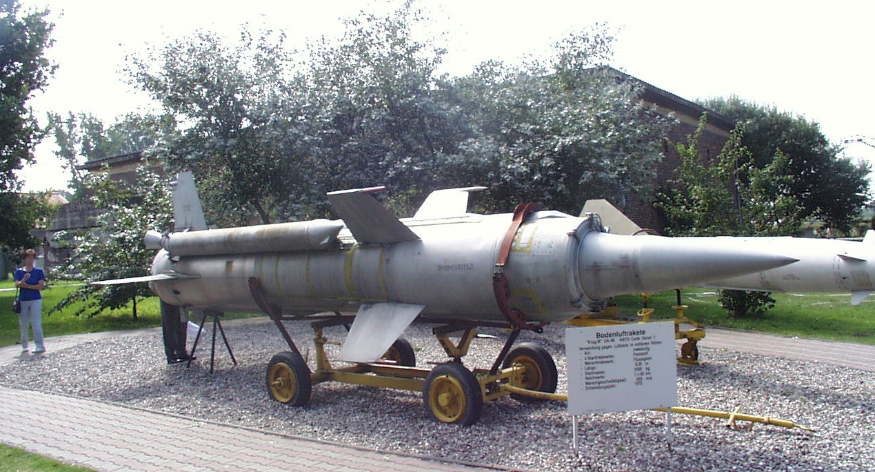 Flugabwehrraketen für große Höhen